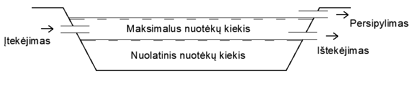 Vandens lygis